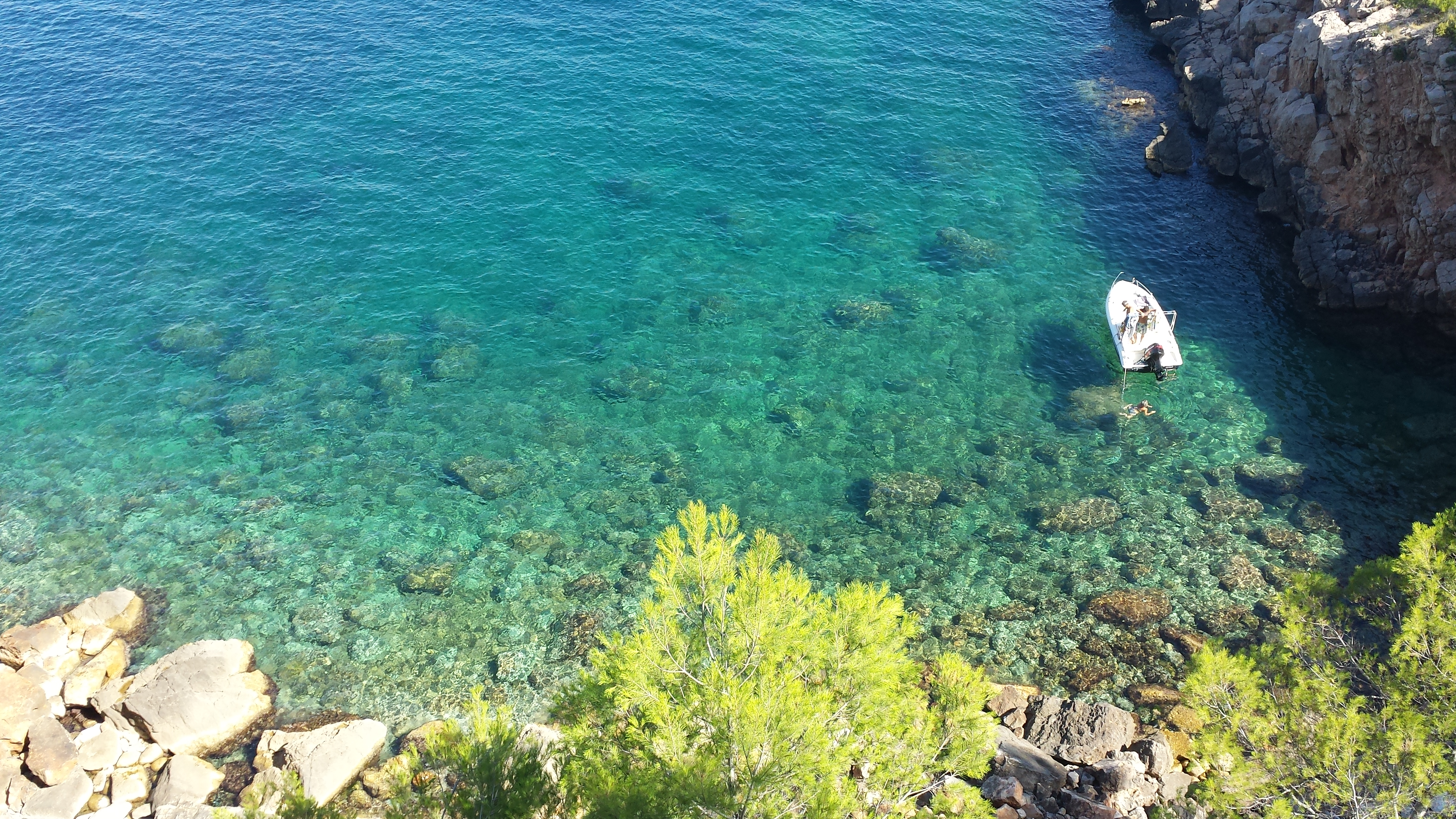 Detall d'una de les cales de Cala Montgó (l'Escala).